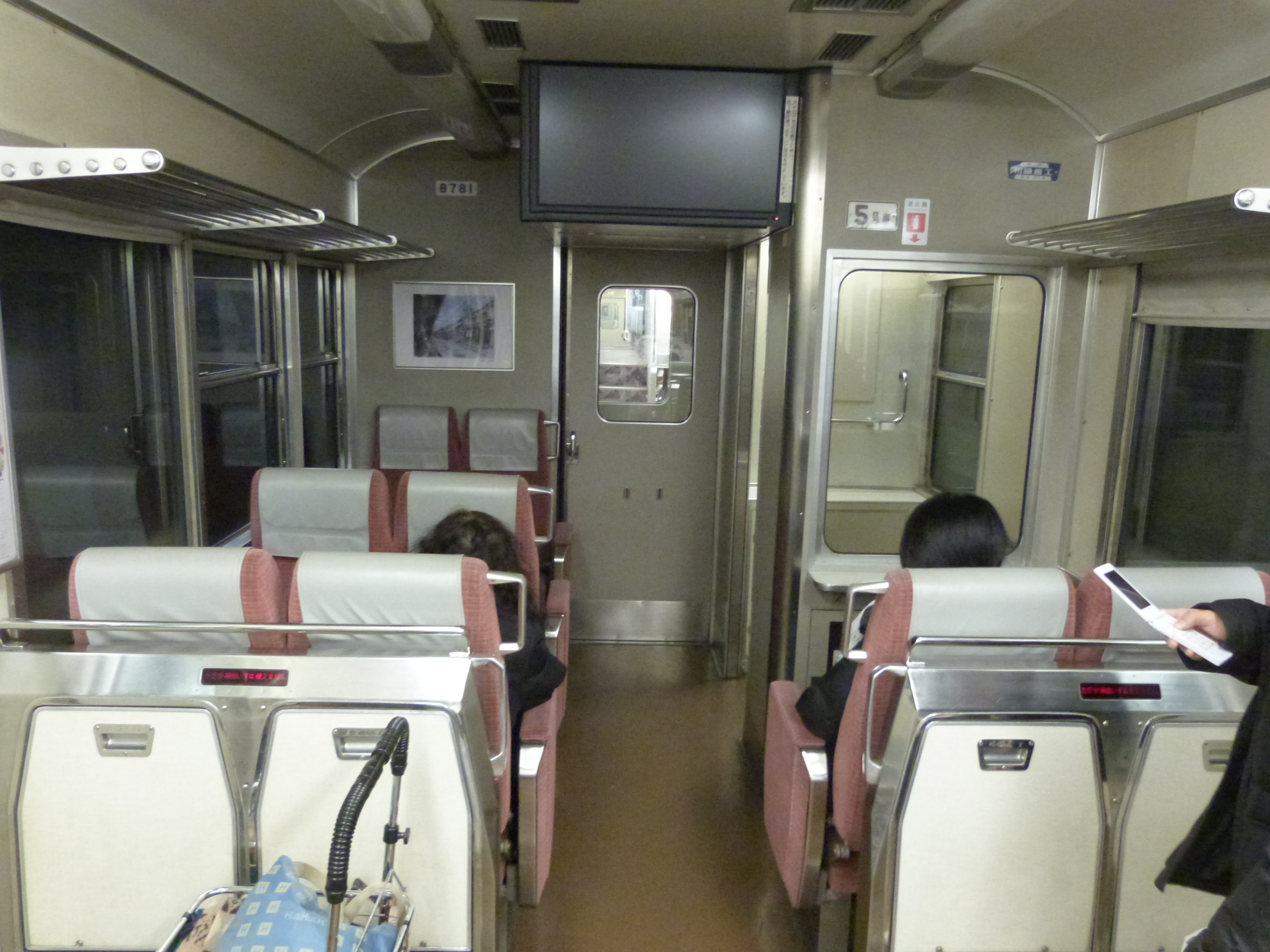 京阪3000系（初代）テレビカー内部。